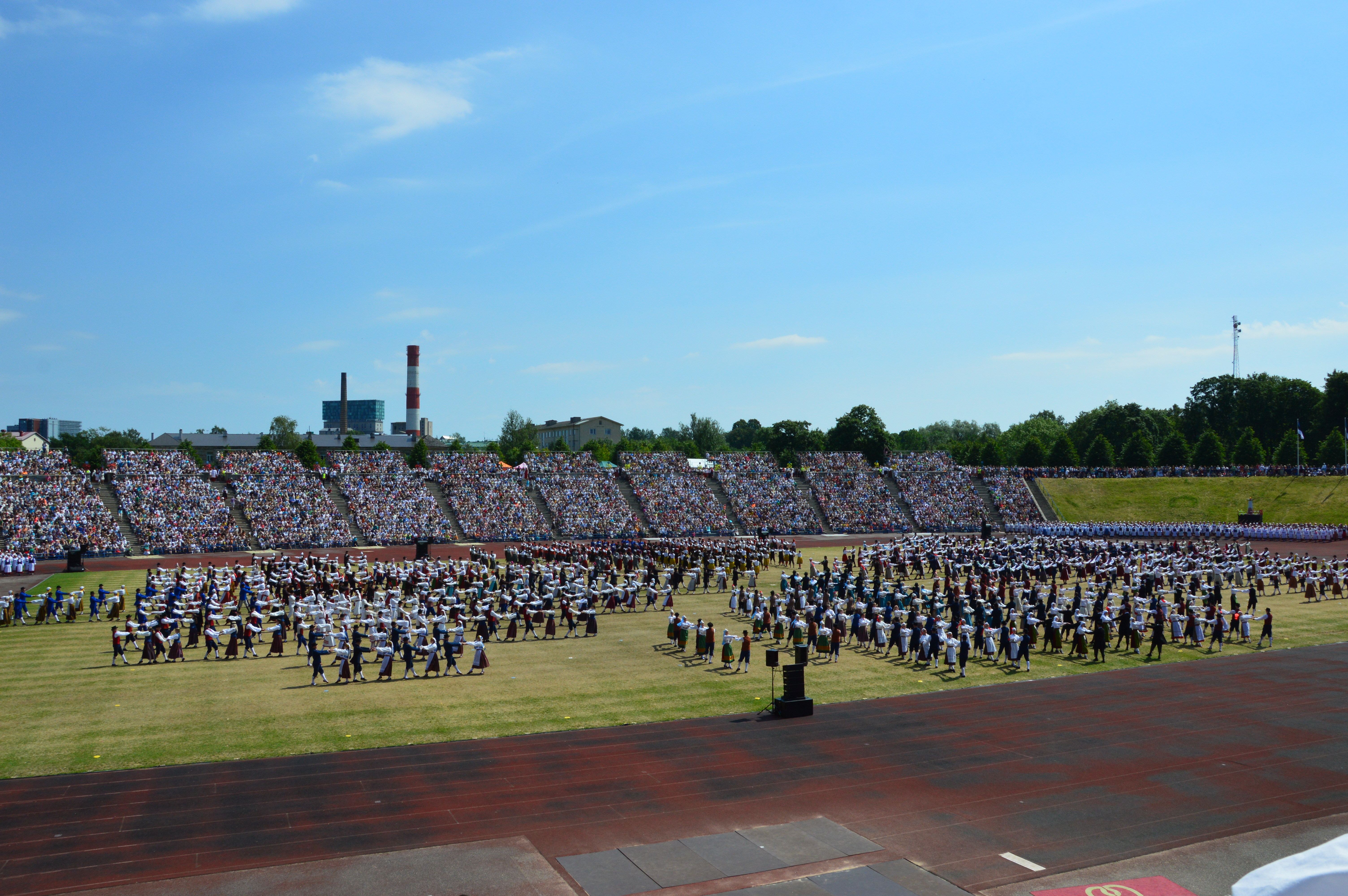 XIX üldtantsupidu Kalevi keskstaadionil.